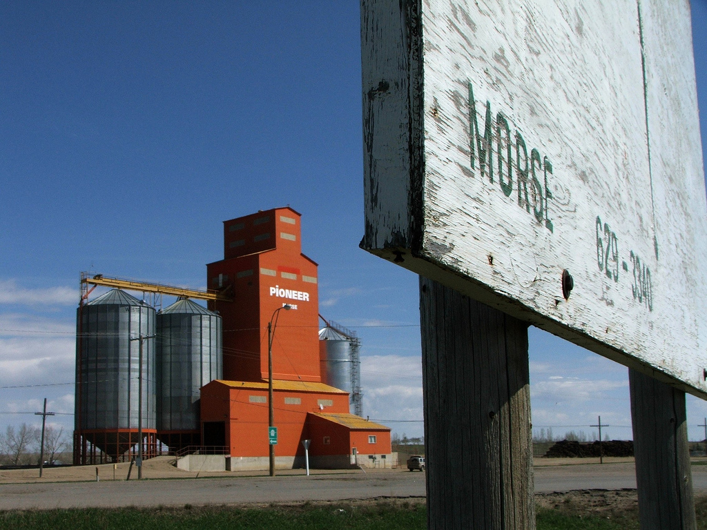 Morse, SK.